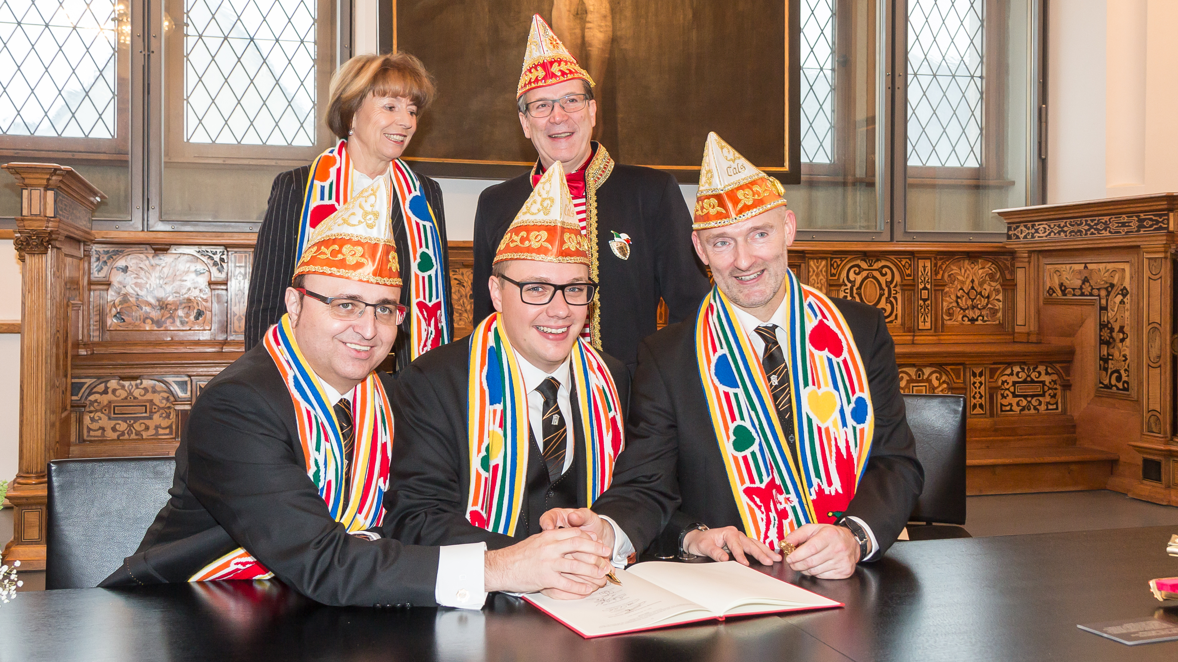 Vertragsunterzeichnung Sessionsvertrag und Empfang im Senatssaal des Historischen Rathauses von Köln zur Session 2017/18 Foto: Prinz Michael II. (Mitte) mit Bauer Christoph (r.) und Jungfrau Emma (l.) unterzeichnen den Sessionsvertrag. Dahinter stehend: Oberbürgermeisterin Henriette Reker